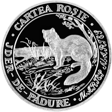 Реверс памятной монеты "Лесная куница"